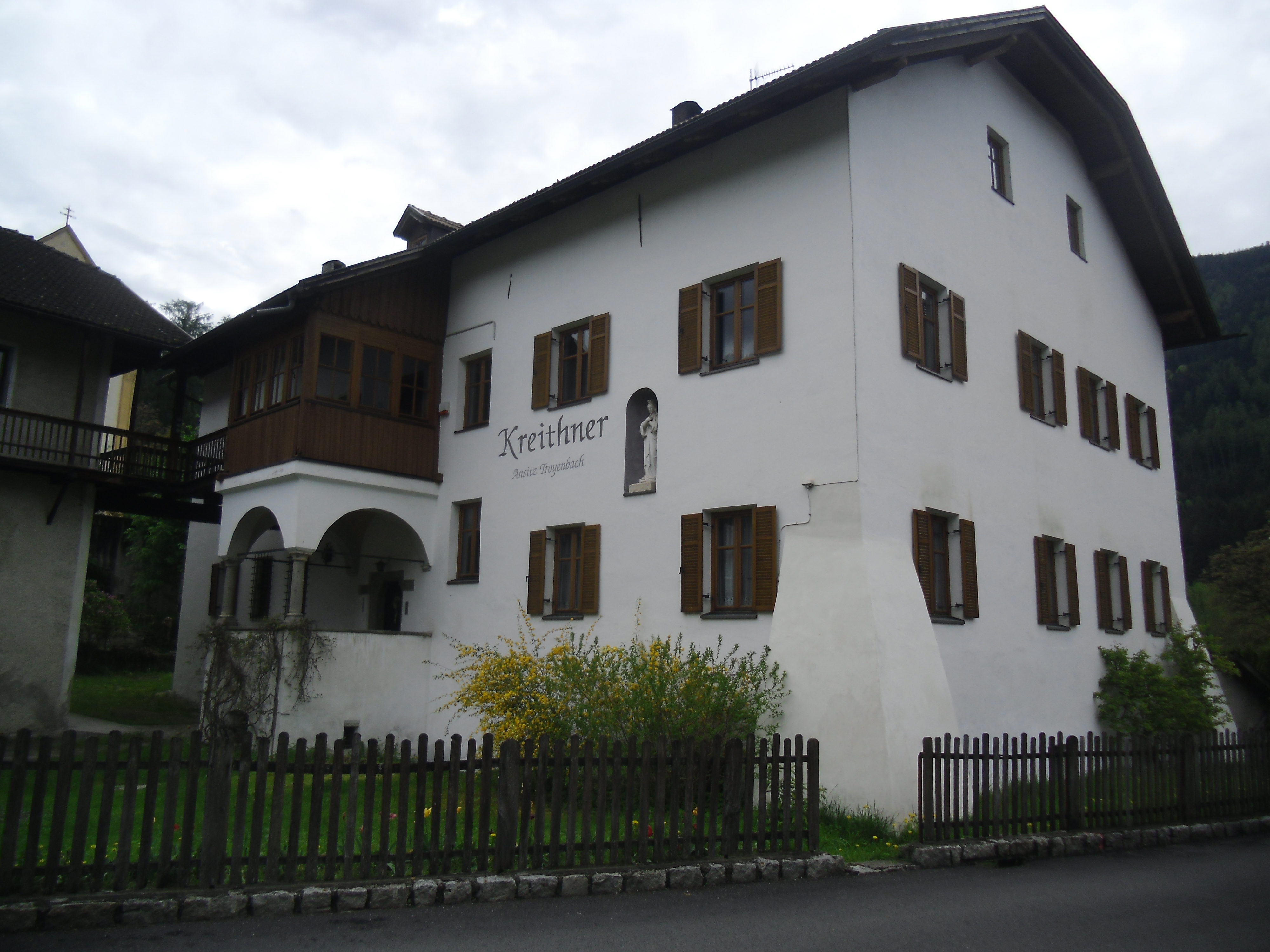 Ansitz Troyenbach in Vintl (Südtirol)